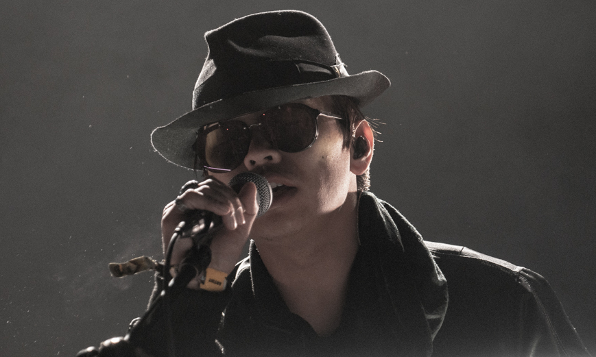 ZHU